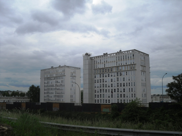 Les tours de la cité La Prairie d'Oly à Montgeron (91)